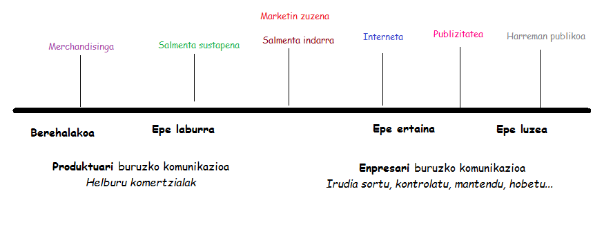 Komunikazio plan bat garatzeko erabili daitezkeen tresnen eskema bat da.